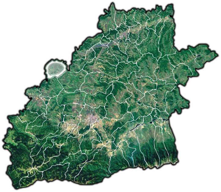 Pauca jud Sibiu